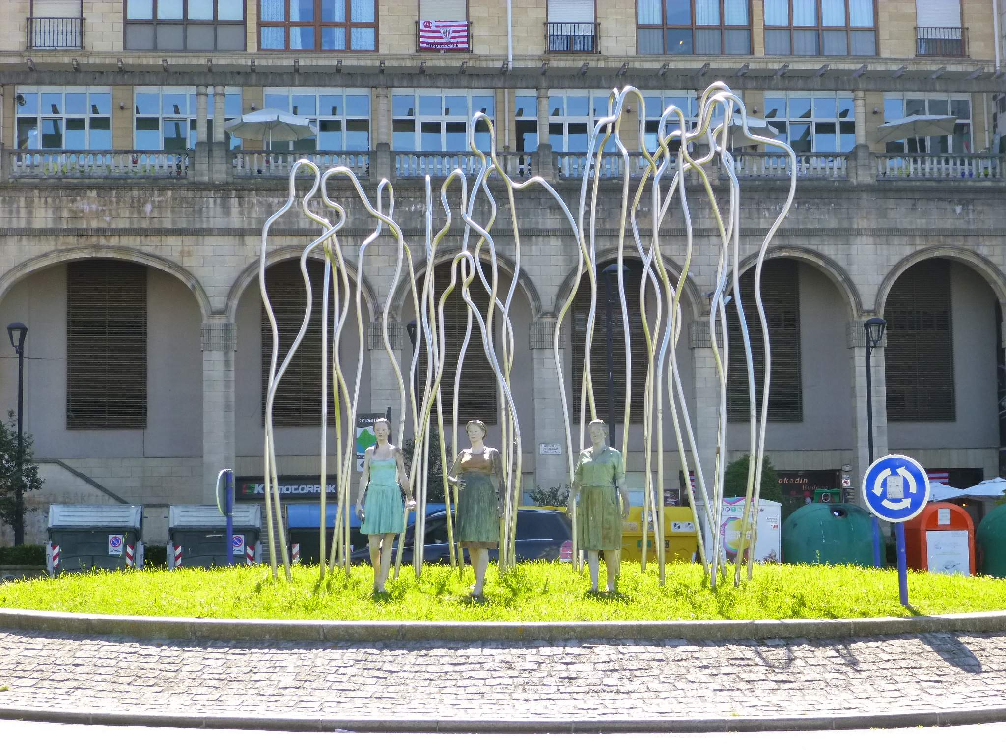 Ondarroa (Bizkaia)